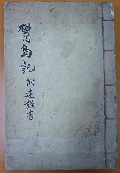 大韓帝国 勅令41号の基となった『鬱島記』